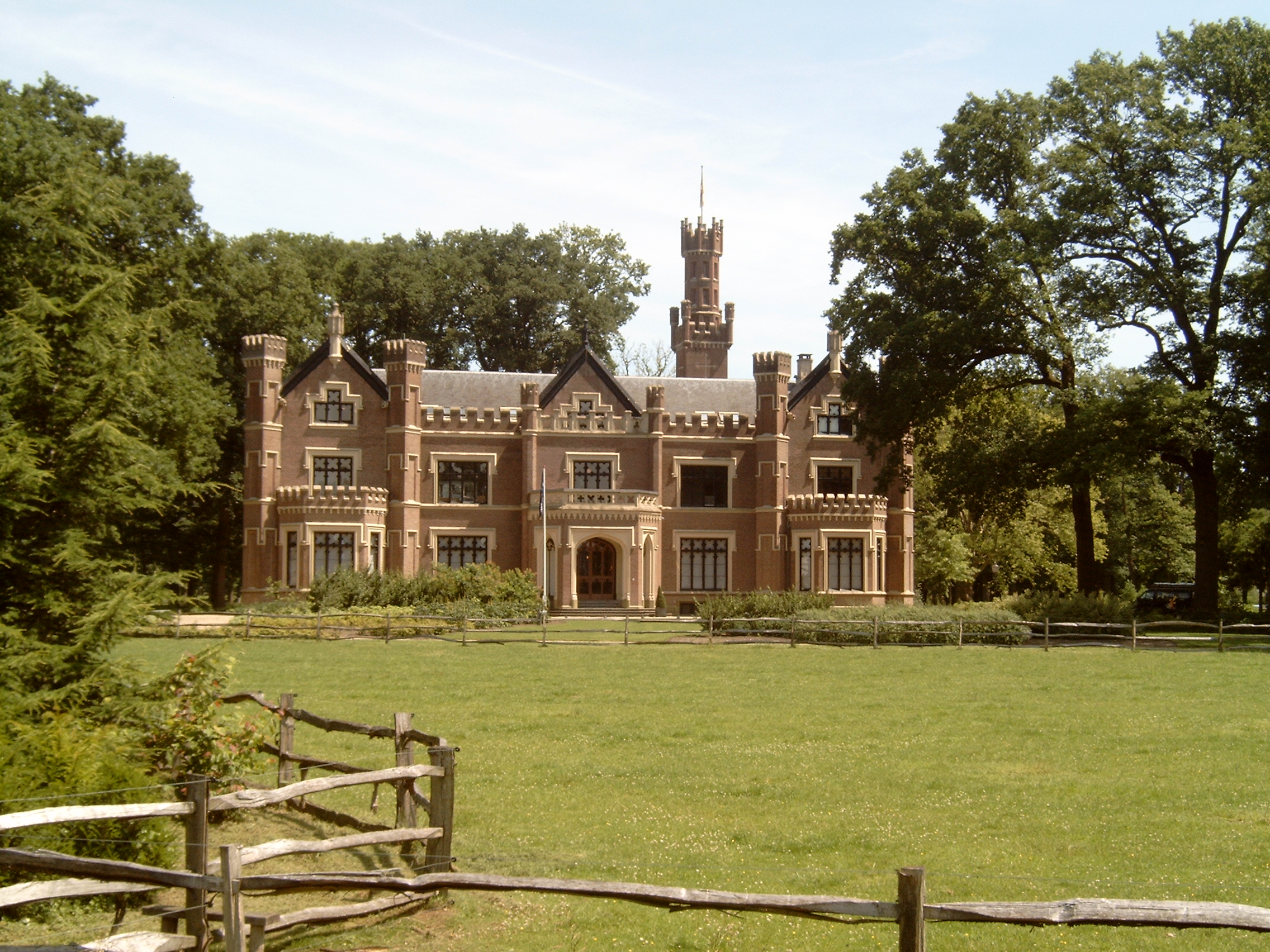 Barneveld, kasteel